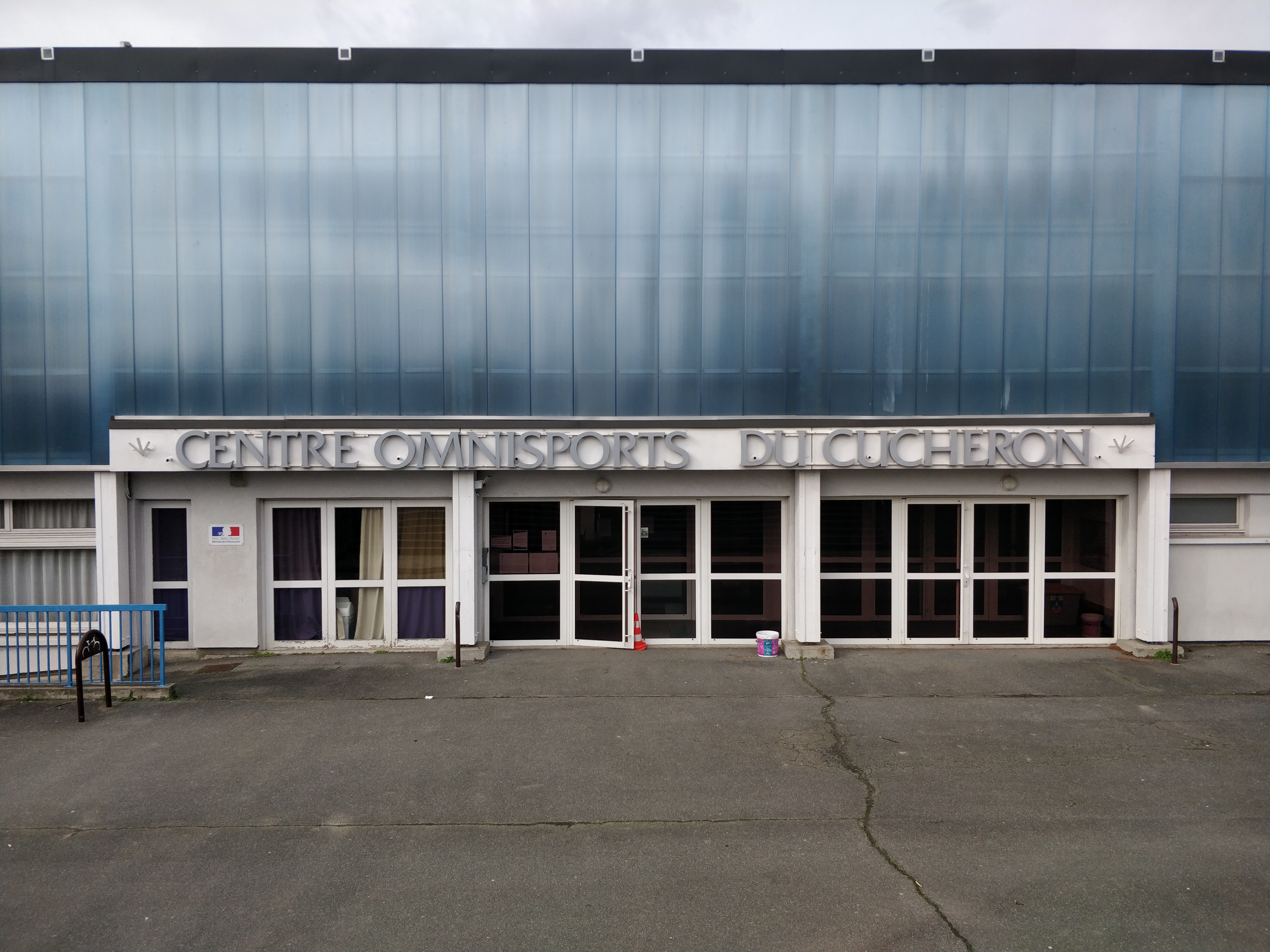 Centre omnisports du Cucheron, Wissous.